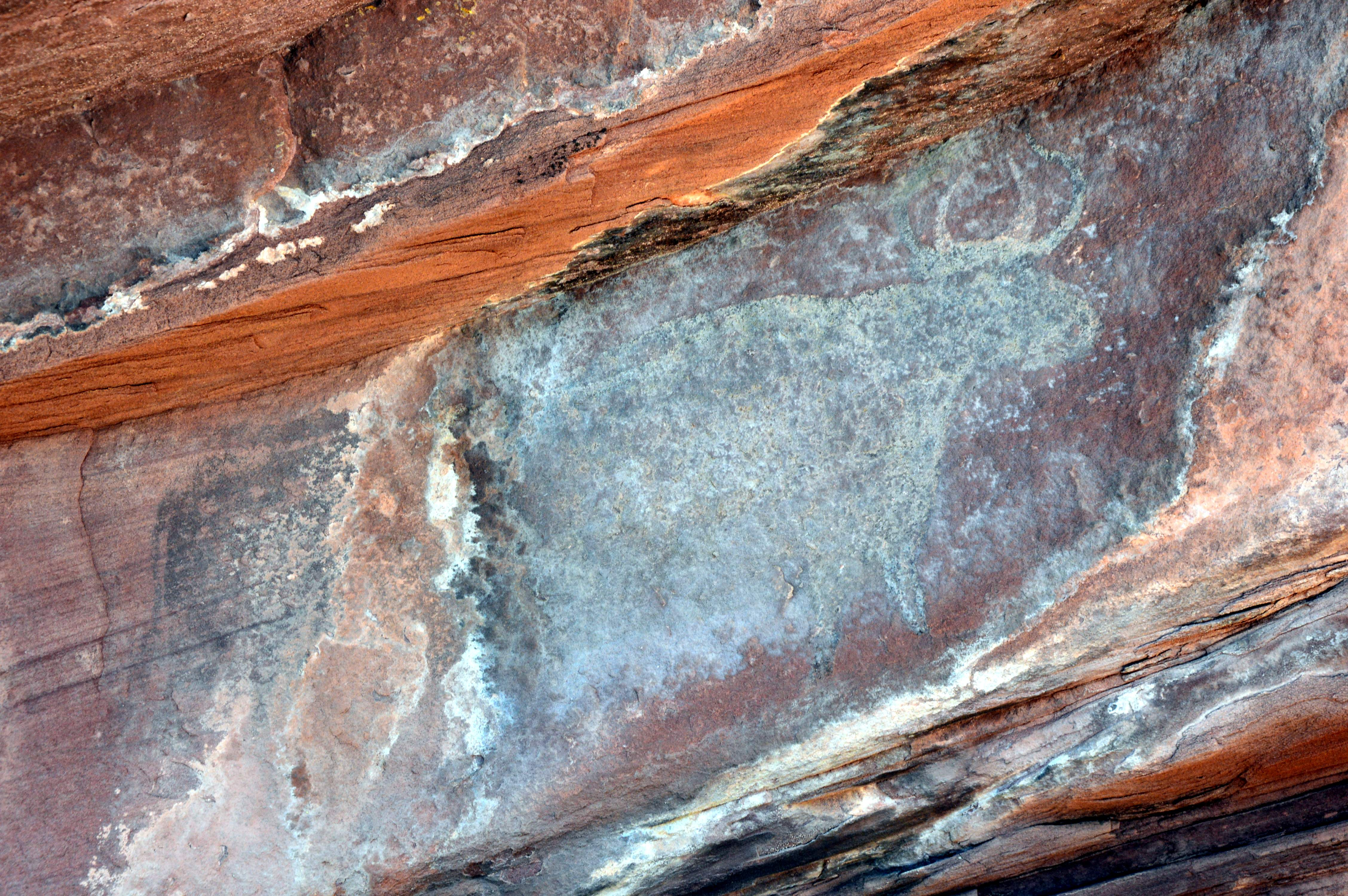 Detalle de bóvido (tratamiento digital: positivo) en la Ceja de Piezarrodilla de Tormón, Parque Cultural de Albarracín (2018).